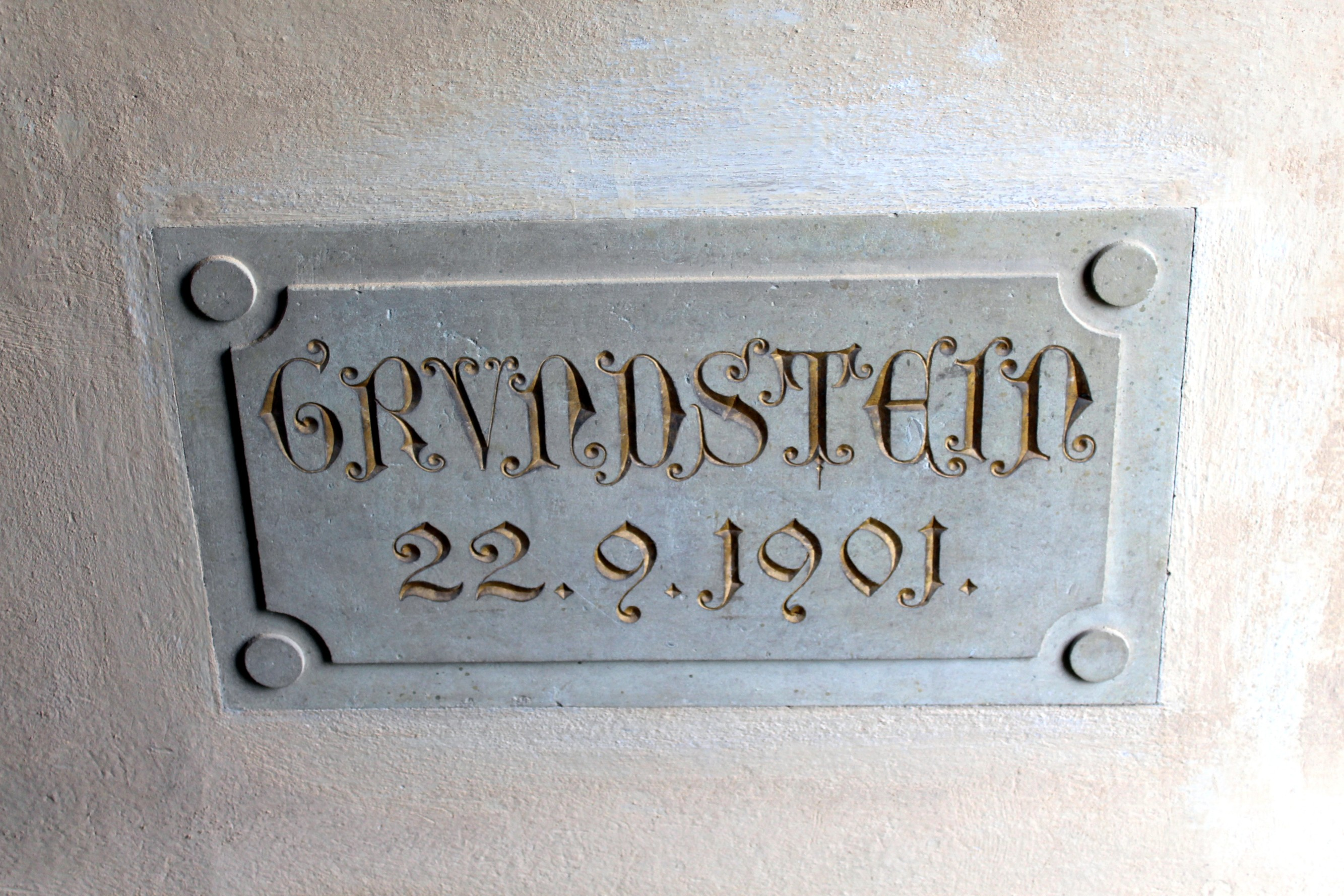 Evangelický kostel v Jablonném v Podještědí